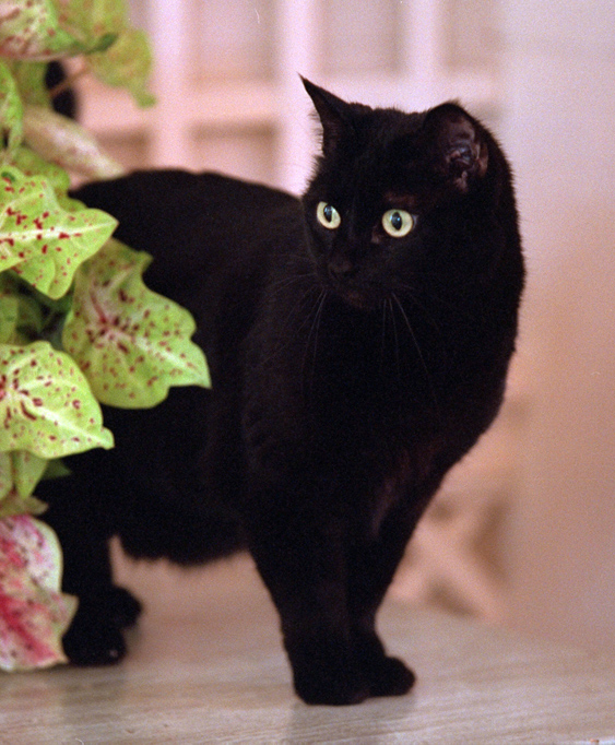 India Cat